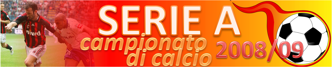 Foto tratta da qui, immagine tratta da questa, il resto Ã¨ una rielaborazione personale.